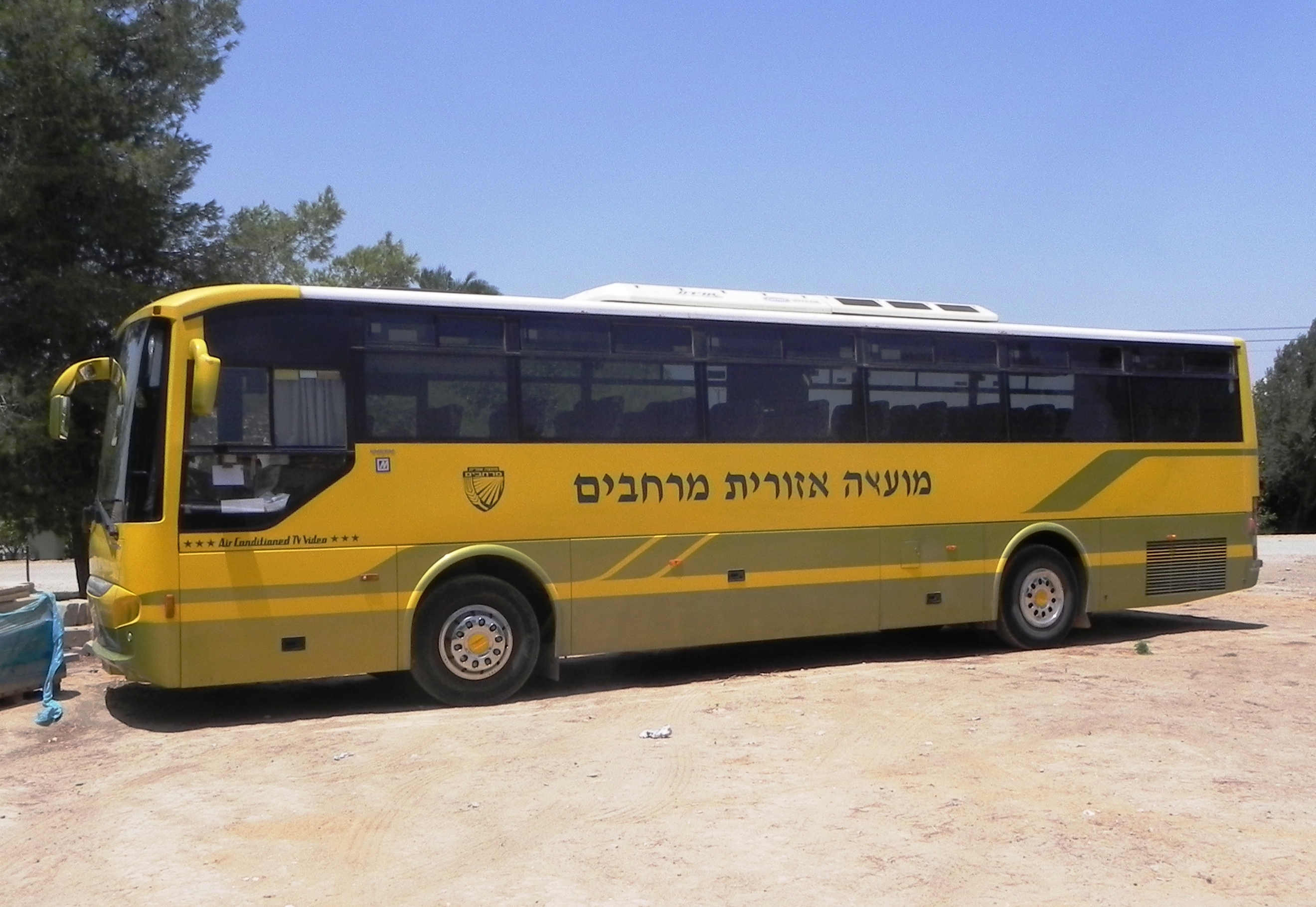 אטובוס של מועצה אזורית מרחבים.